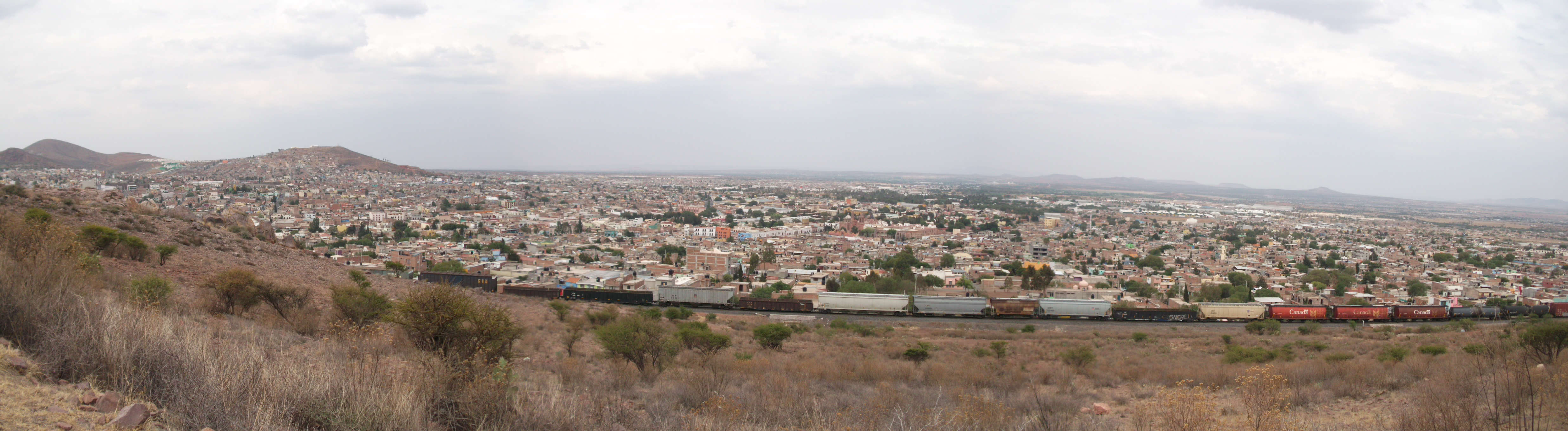 una panoramica desde el cerro de las cuevas